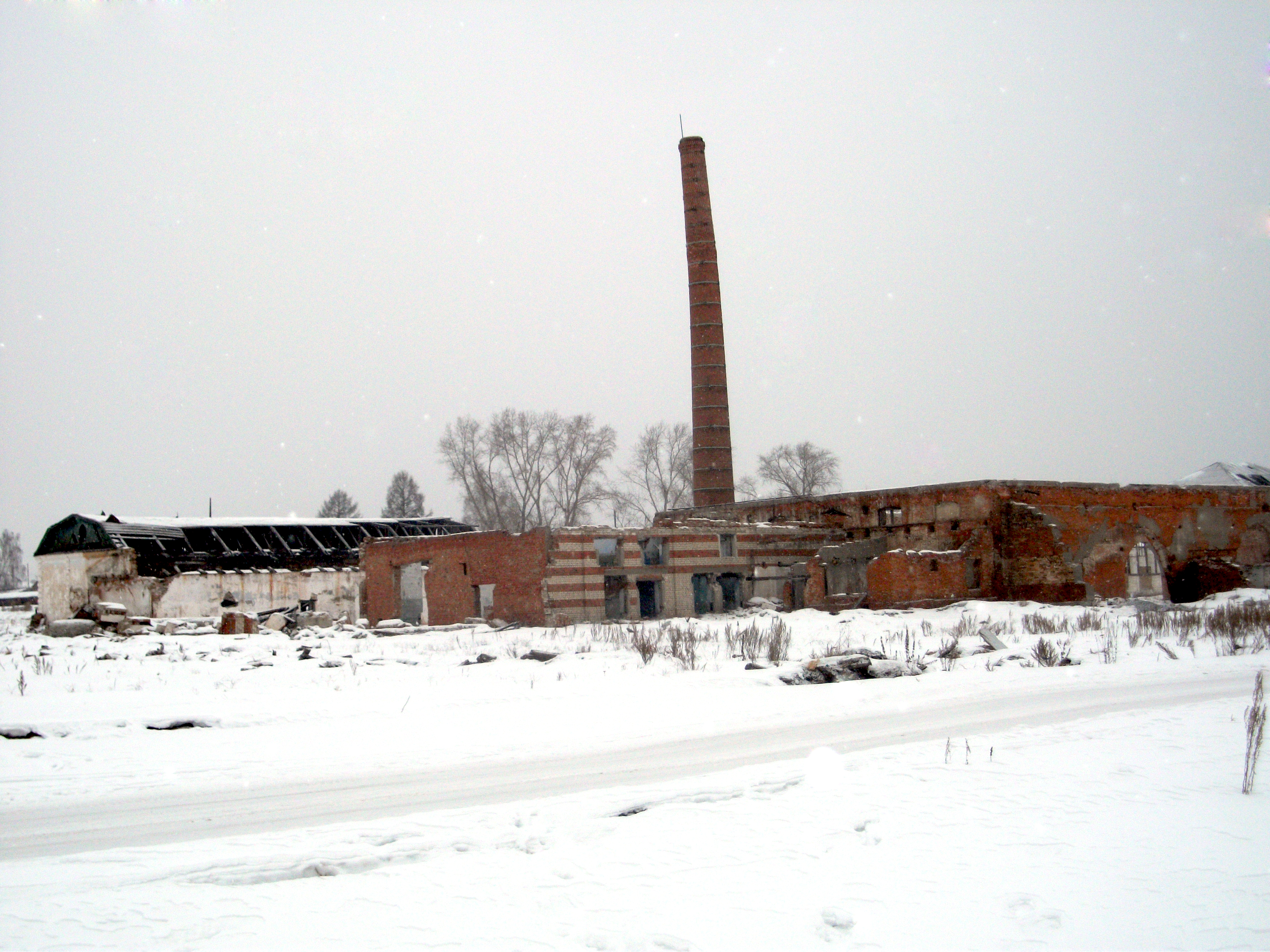 Развалины стекольного завода п. Ертарский.